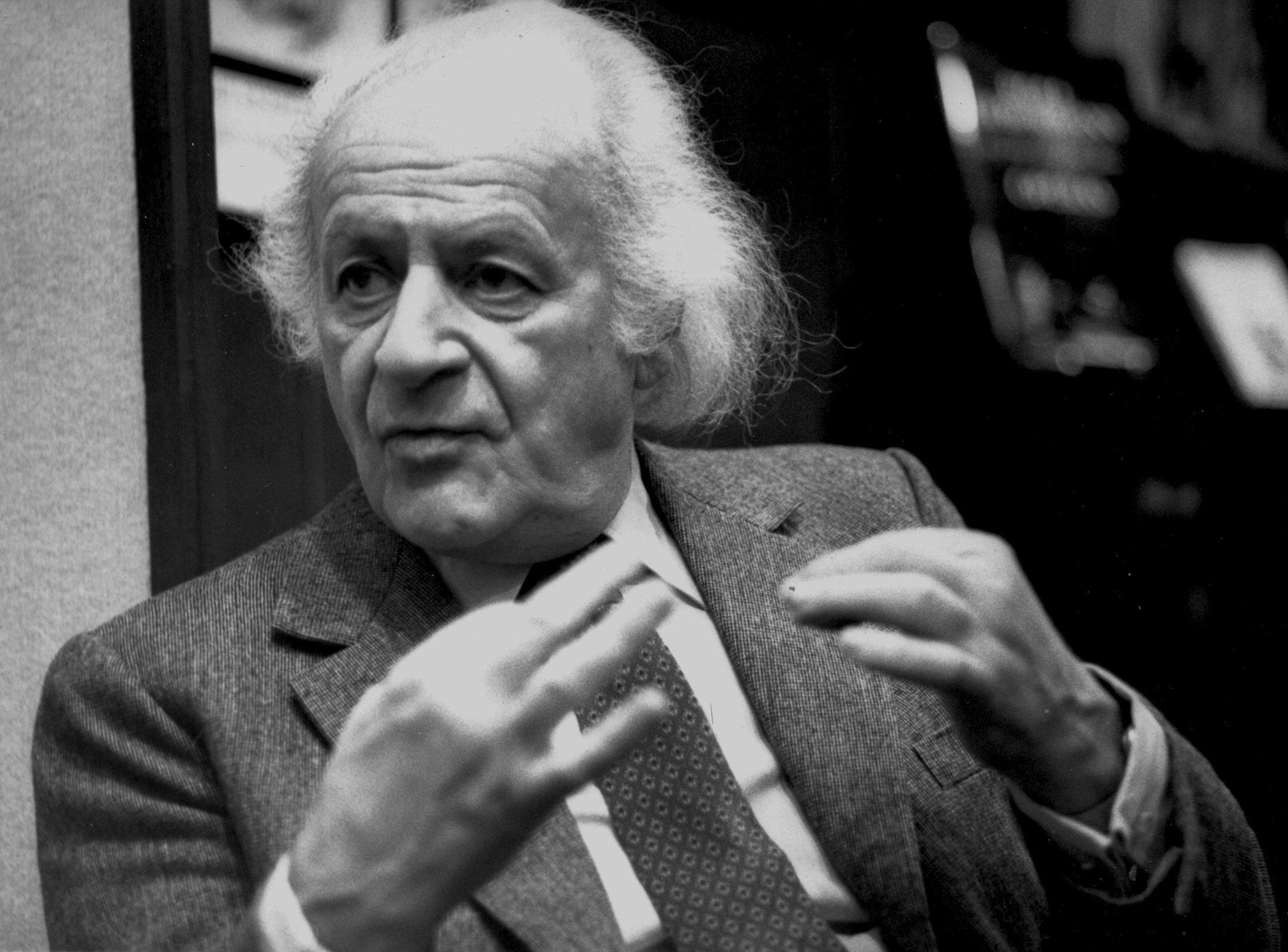 Rolf Liebermann est un musicien suisse, né à Zurich le 14 septembre 1910 et mort à Paris le 2 janvier 1999. Il a été compositeur, chef d'orchestre, metteur en scène et producteur.